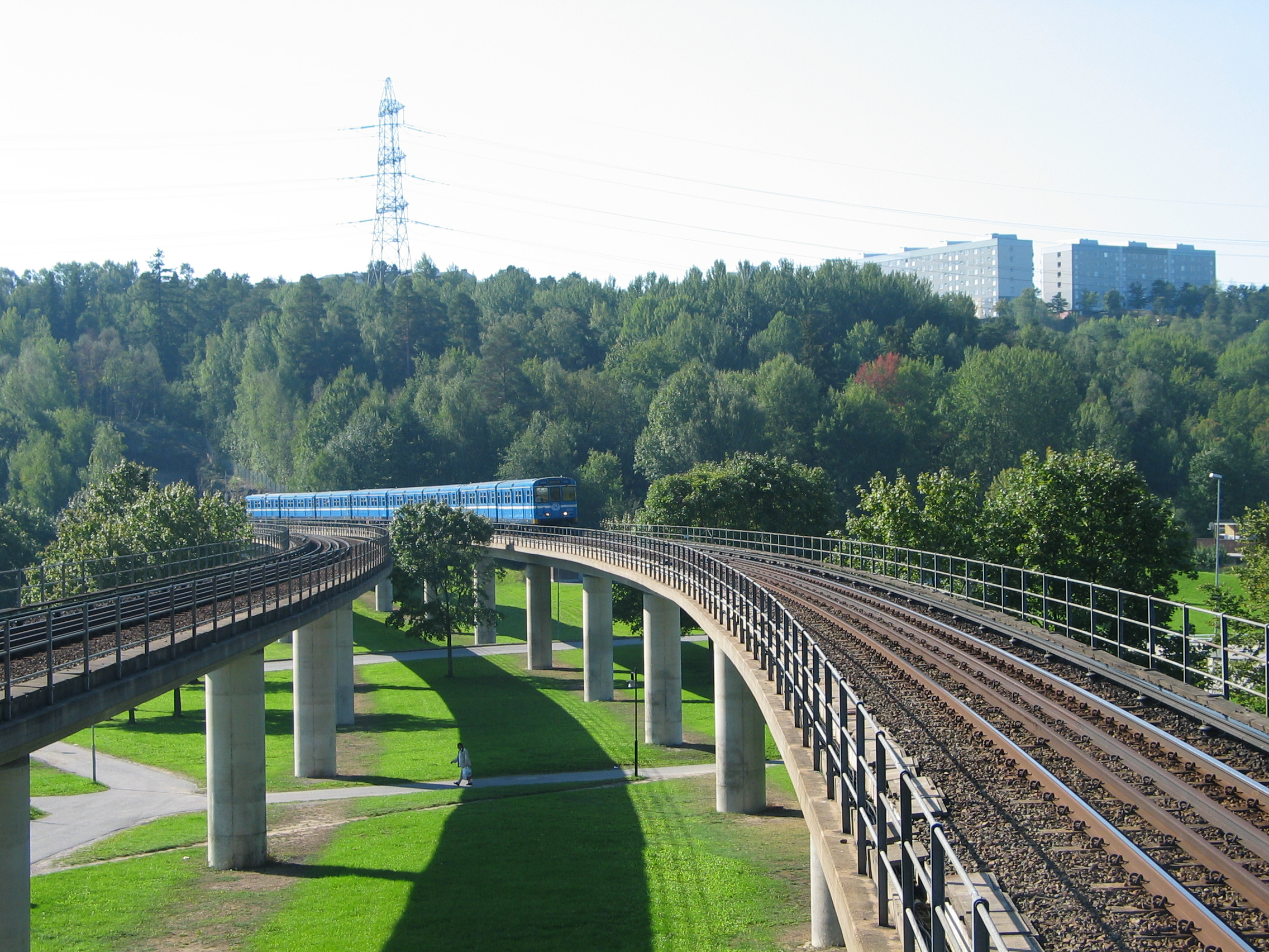 Fittja, a metro station in Stockholm, Sweden.